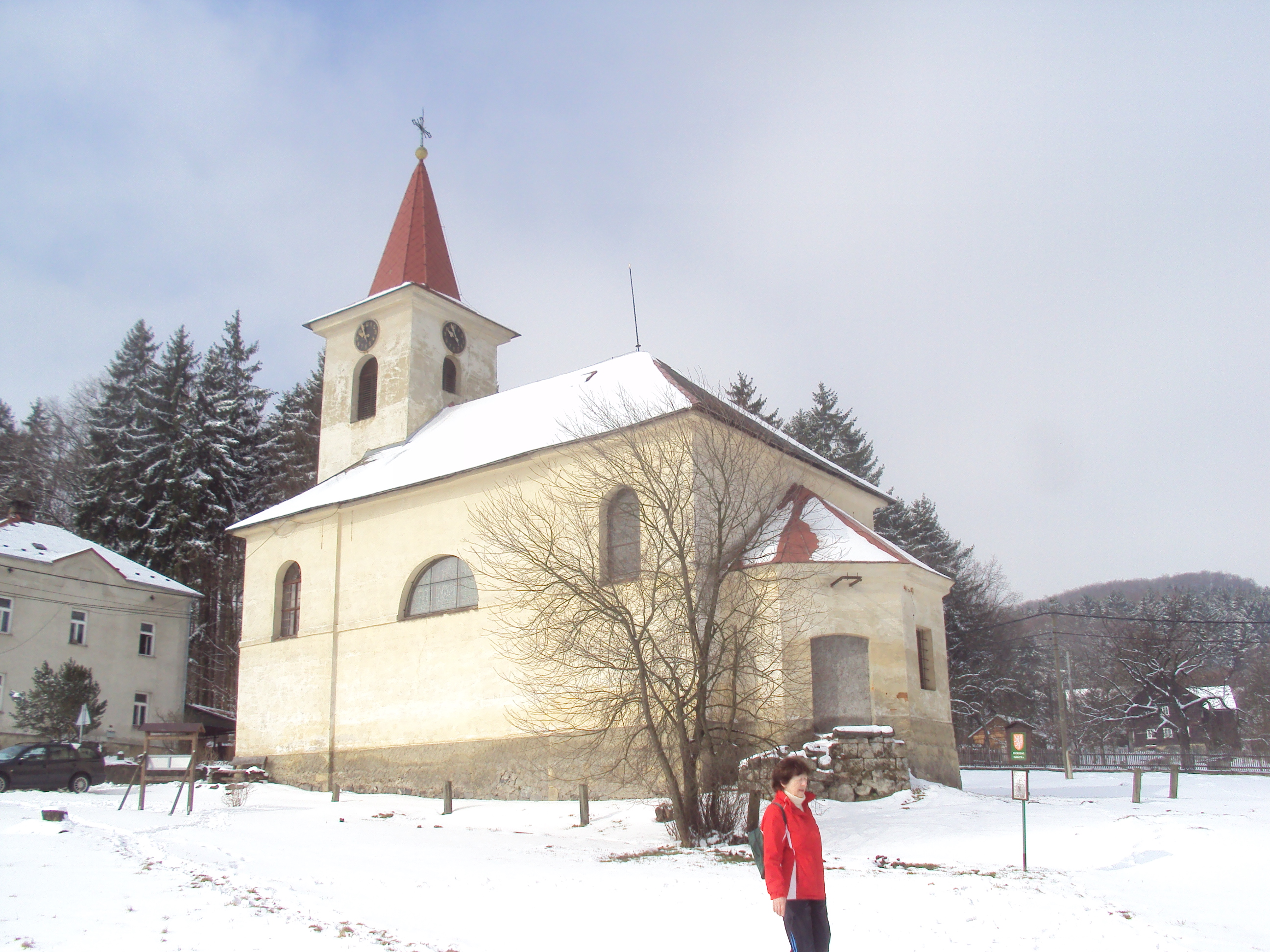 Kostelík v Slunečné